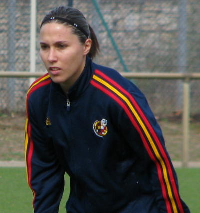 María Paz Vilas, spanische Nationalspielerin